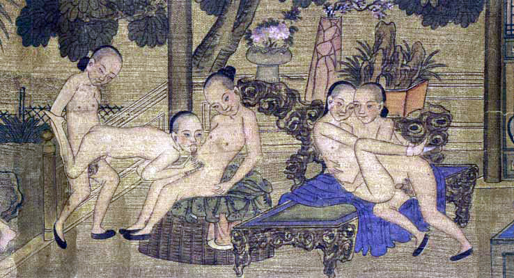 Sujet:Chineeseschen erotesche Rullo Source:ex-Commons Beijing, Qing dynasty, late 19th c.